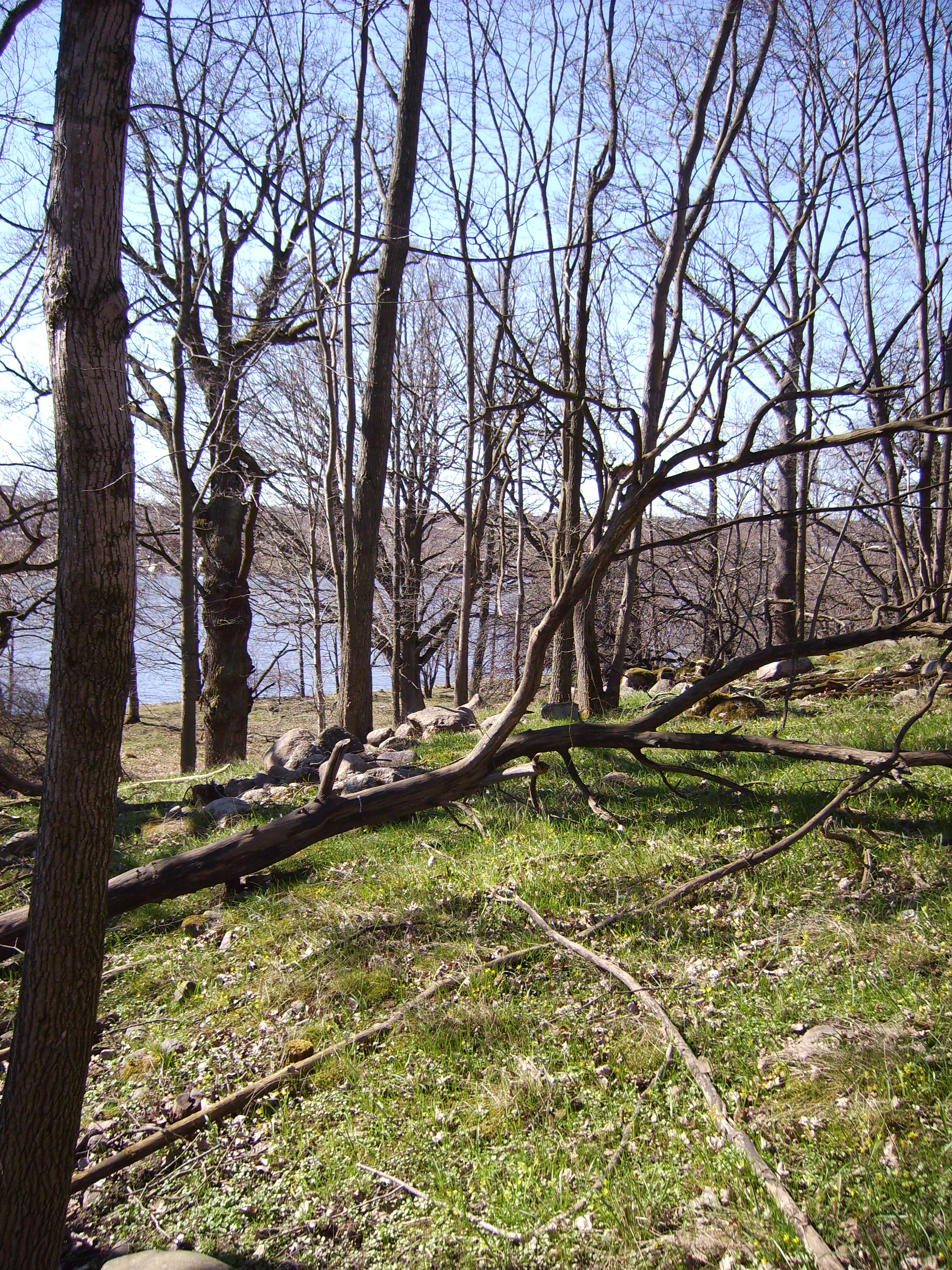 Bilden är fotograferad av Harri Blomberg. Photo by Harri Blomberg.